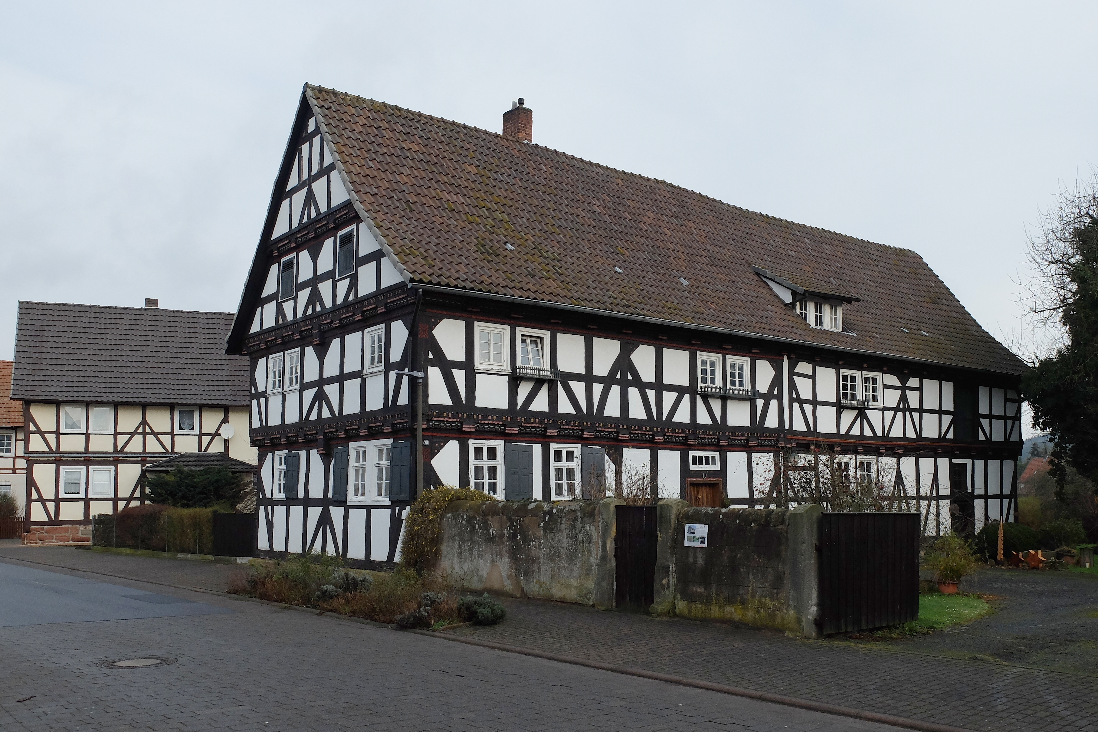 Baumbach' sches Haus, Leipziger Str. 28 Hoheneiche, Wehretal (Hessen)